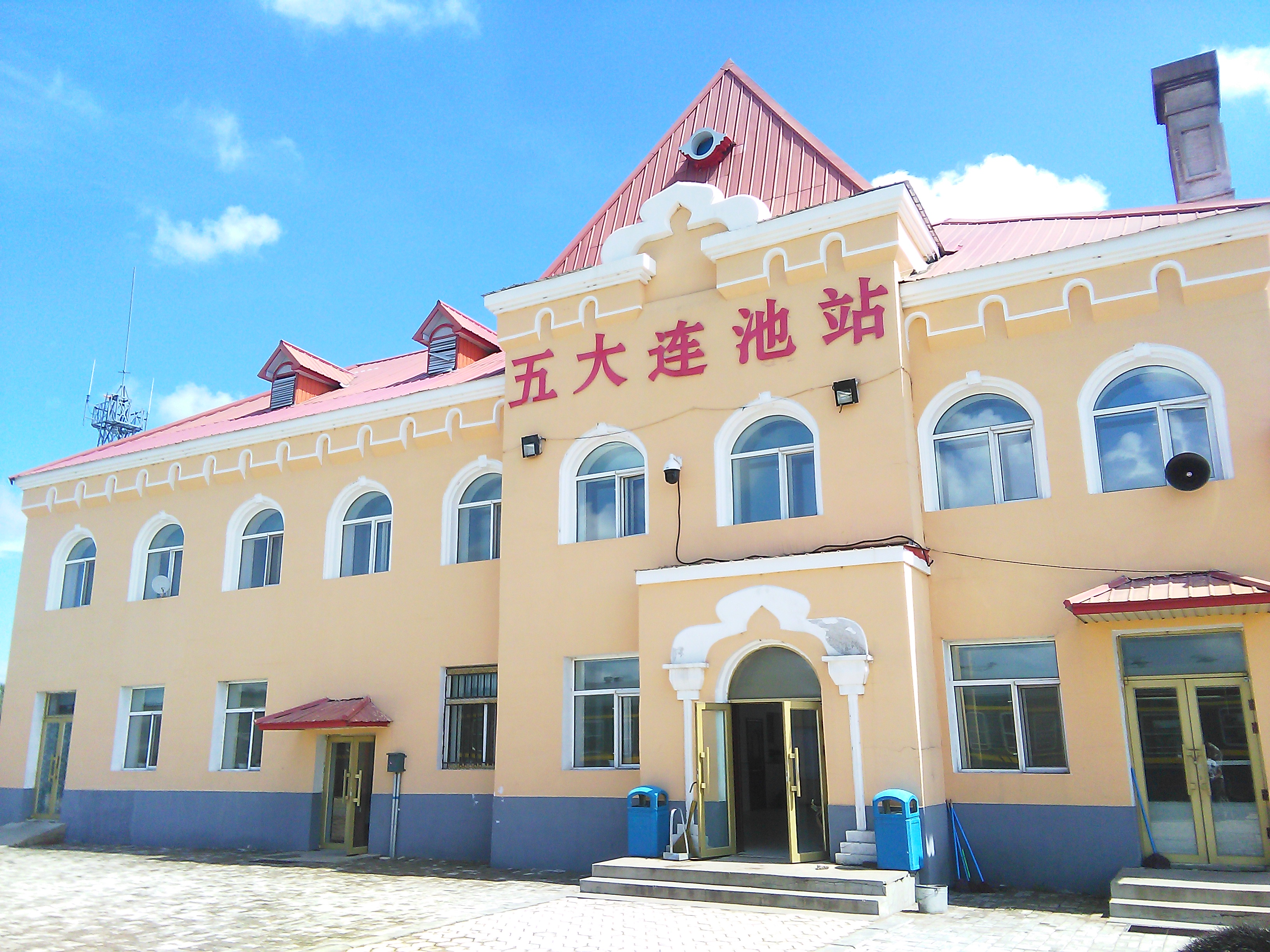 中文（中国大陆）: 五大连池（沾河）火车站